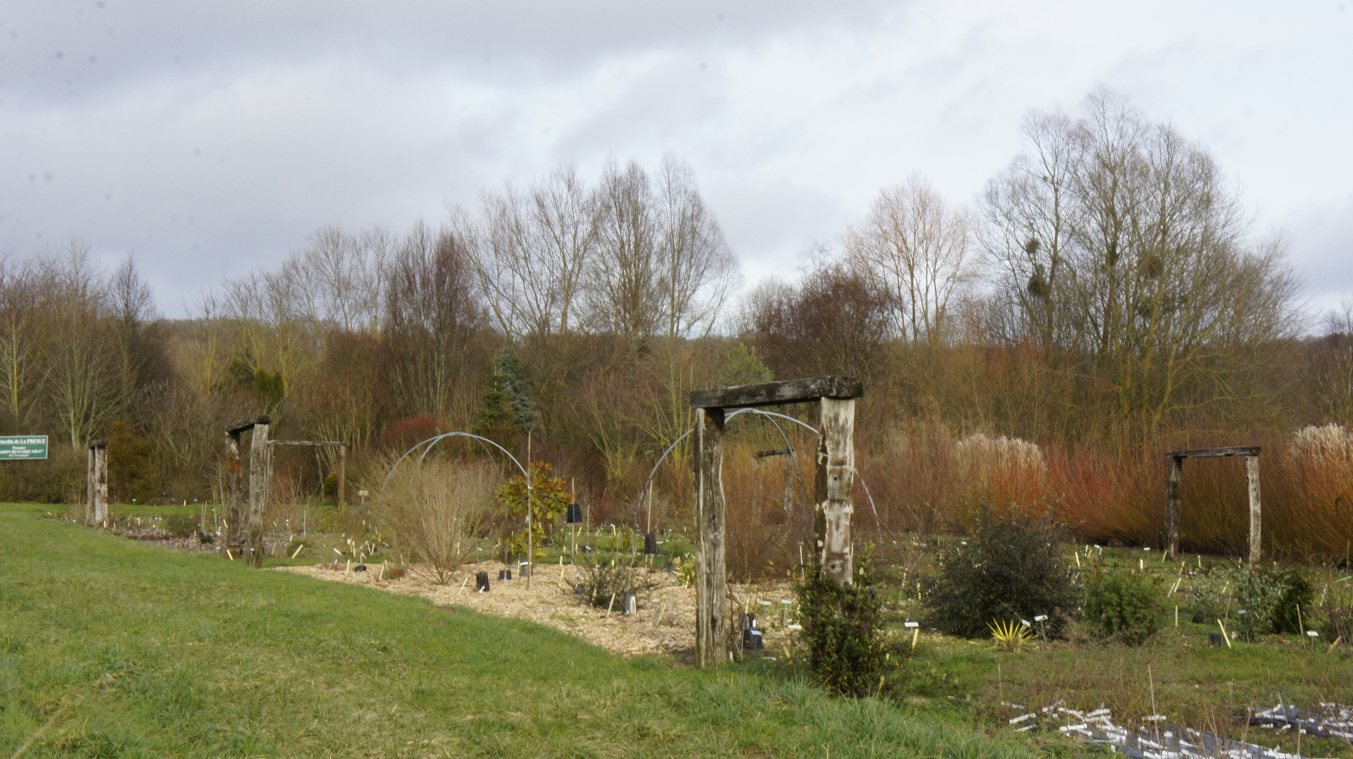 Jardin_au lieu dit la_Presle classé au titre de Jardin remarquable .